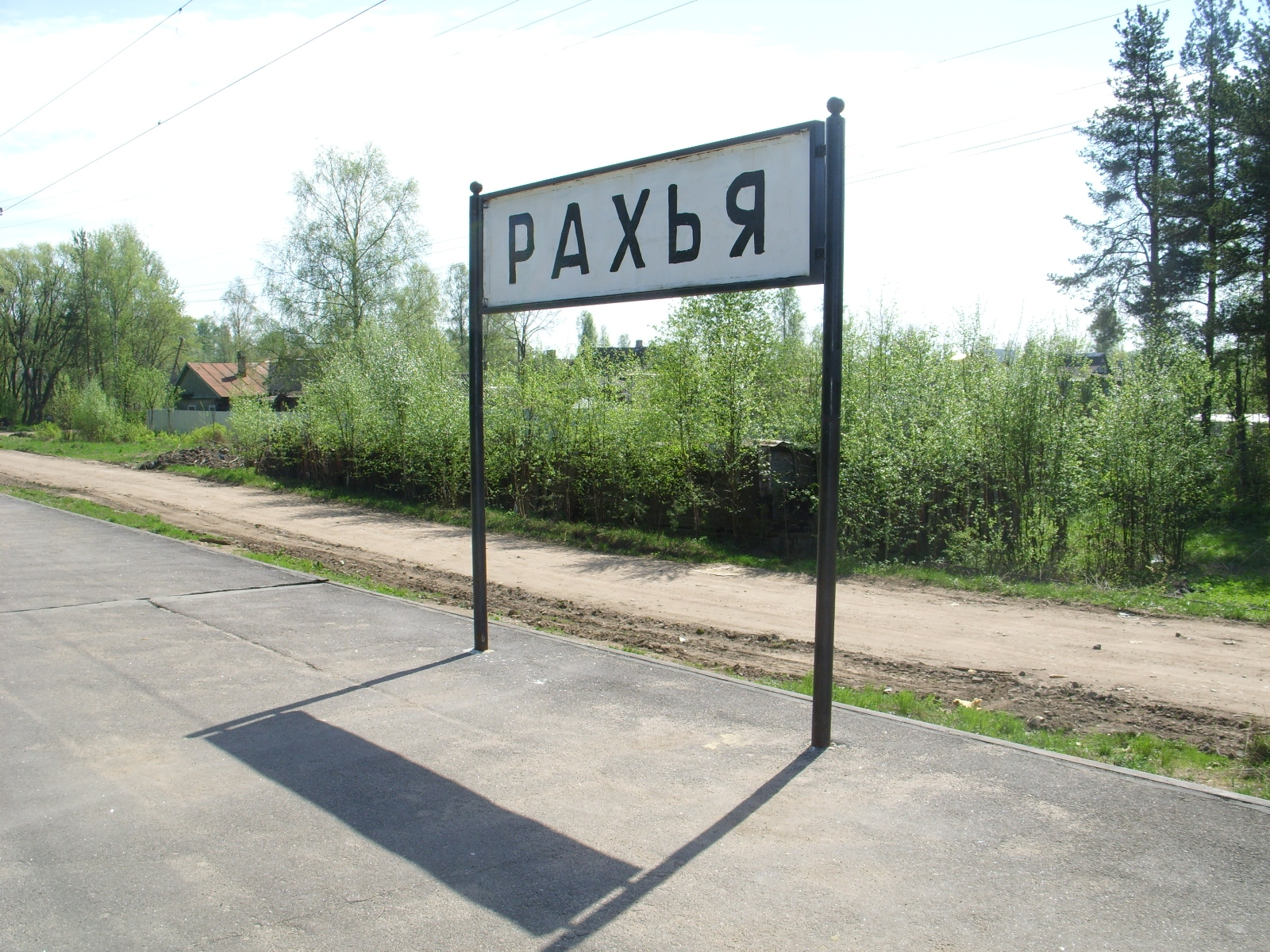 Ст. Рахья, Ленинградская область. Указатель